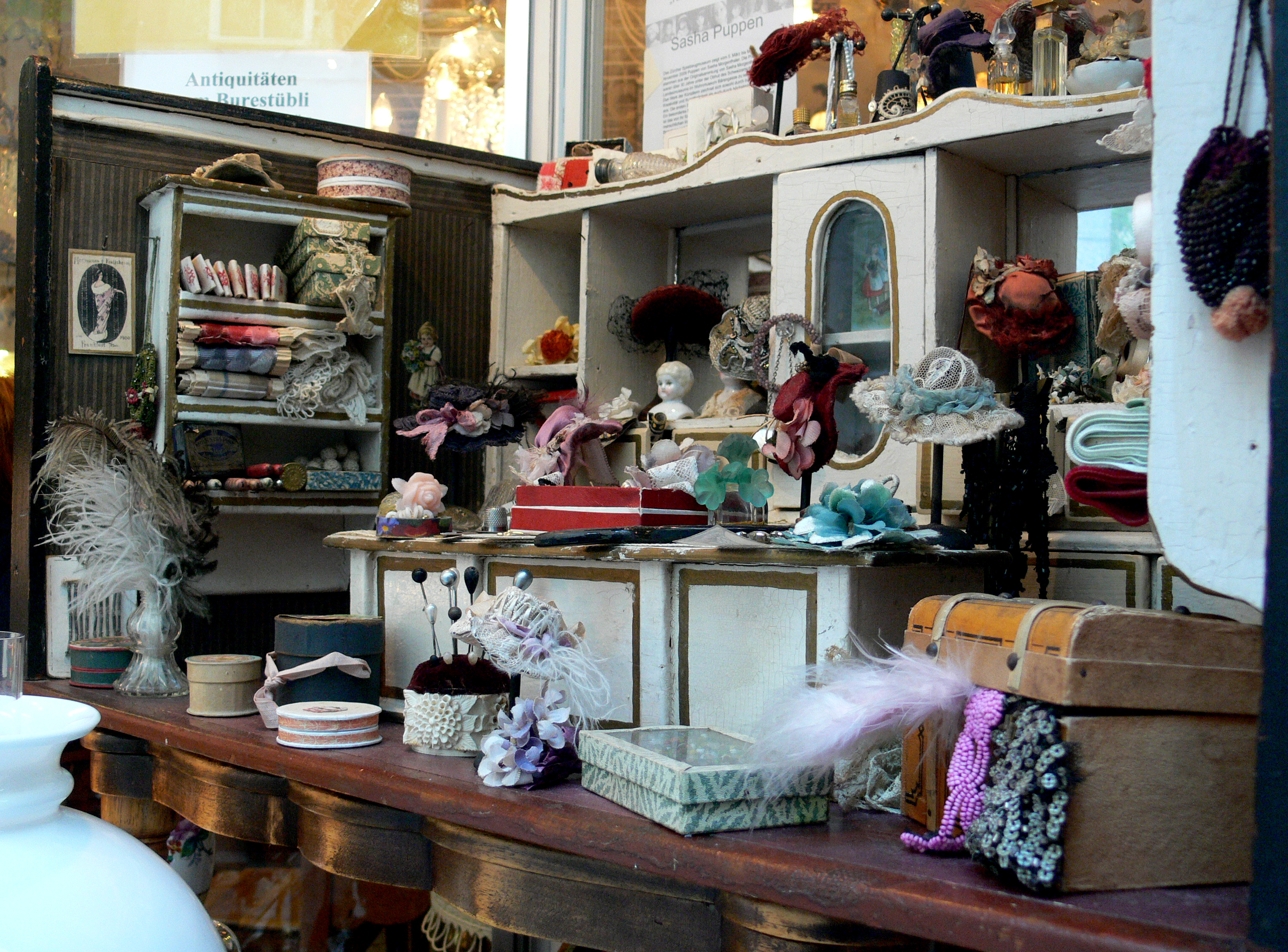 Puppenkaufladen (Hutgeschäft), fotografiert im Schaufenster eines Antiquitätengeschäfts in Zürich